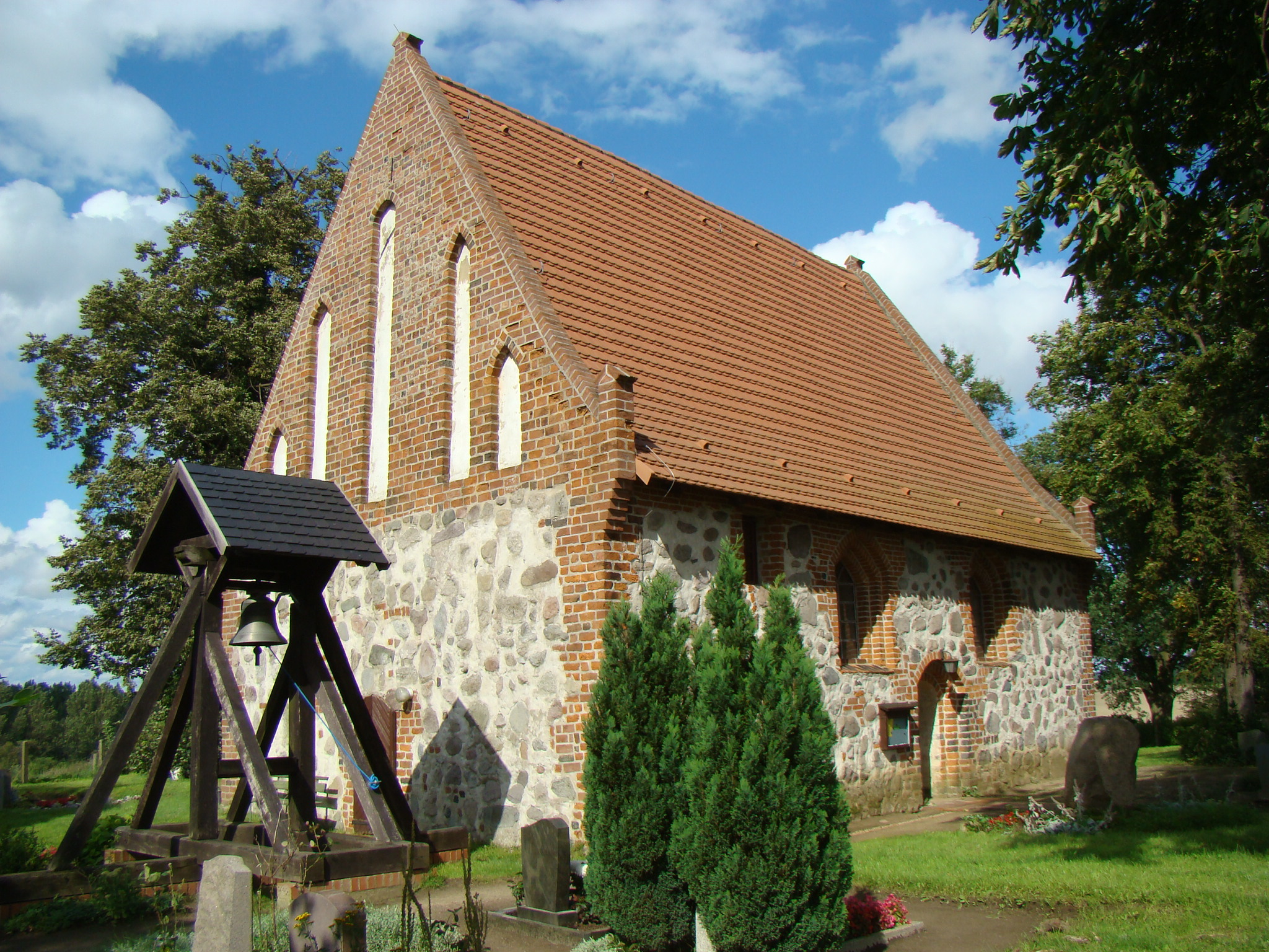 Kirche in Deven. Foto: Peter Schmelzle 2011.